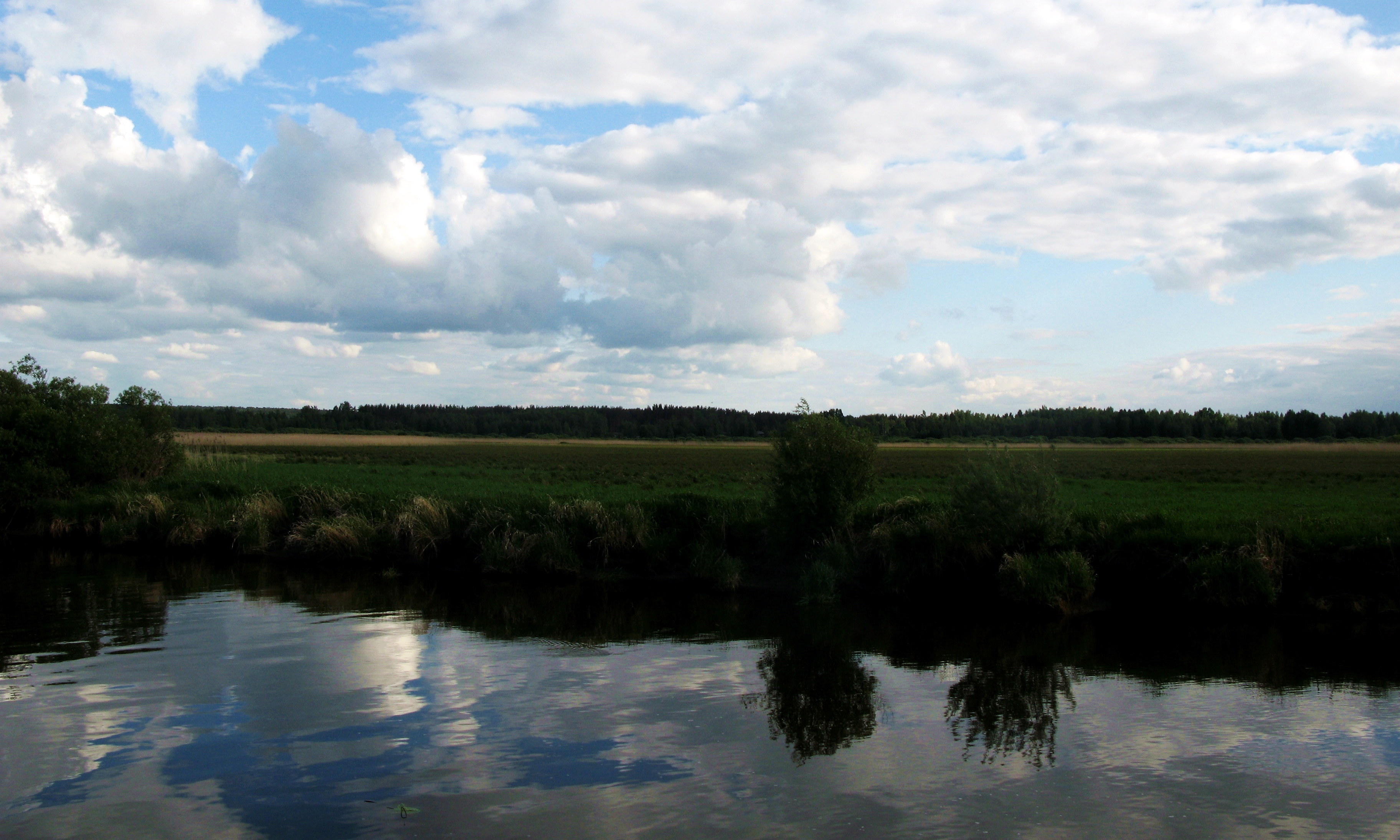 vaade Suurelt-Emajõelt.